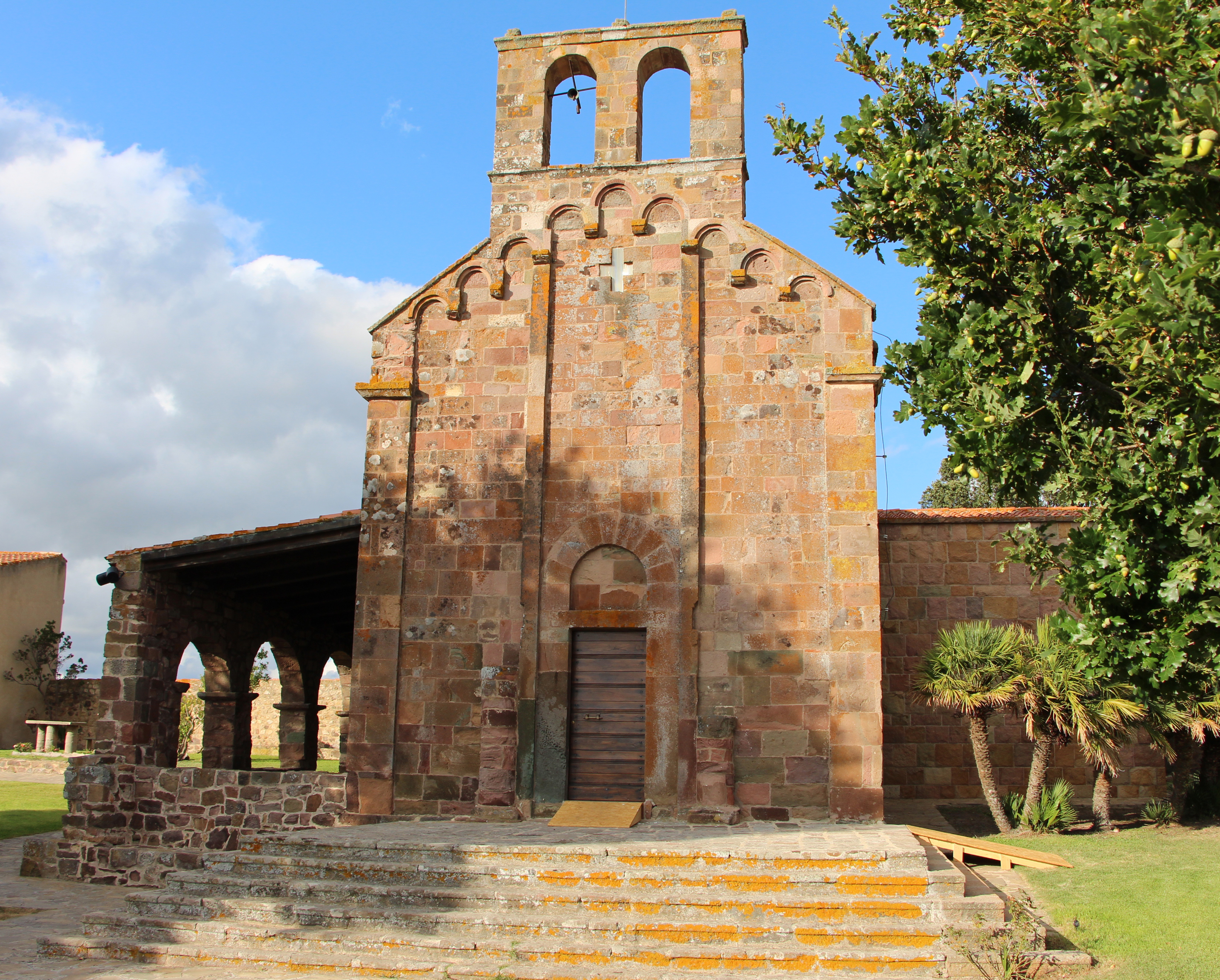 Oschiri